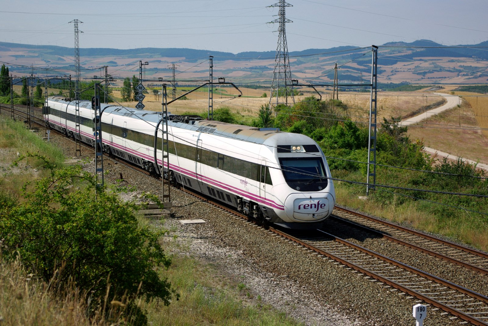 Alvia Barcelona-Irún con material 120 a su paso por Zuasti (Navarra) cerca de Pamplona.